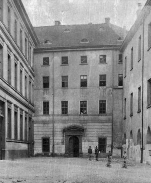 Das Senatsgebäude der Universität Leipzig auf dem Paulinerareal um 1890. Links das Augusteum, rechts das Mittelpaulinum